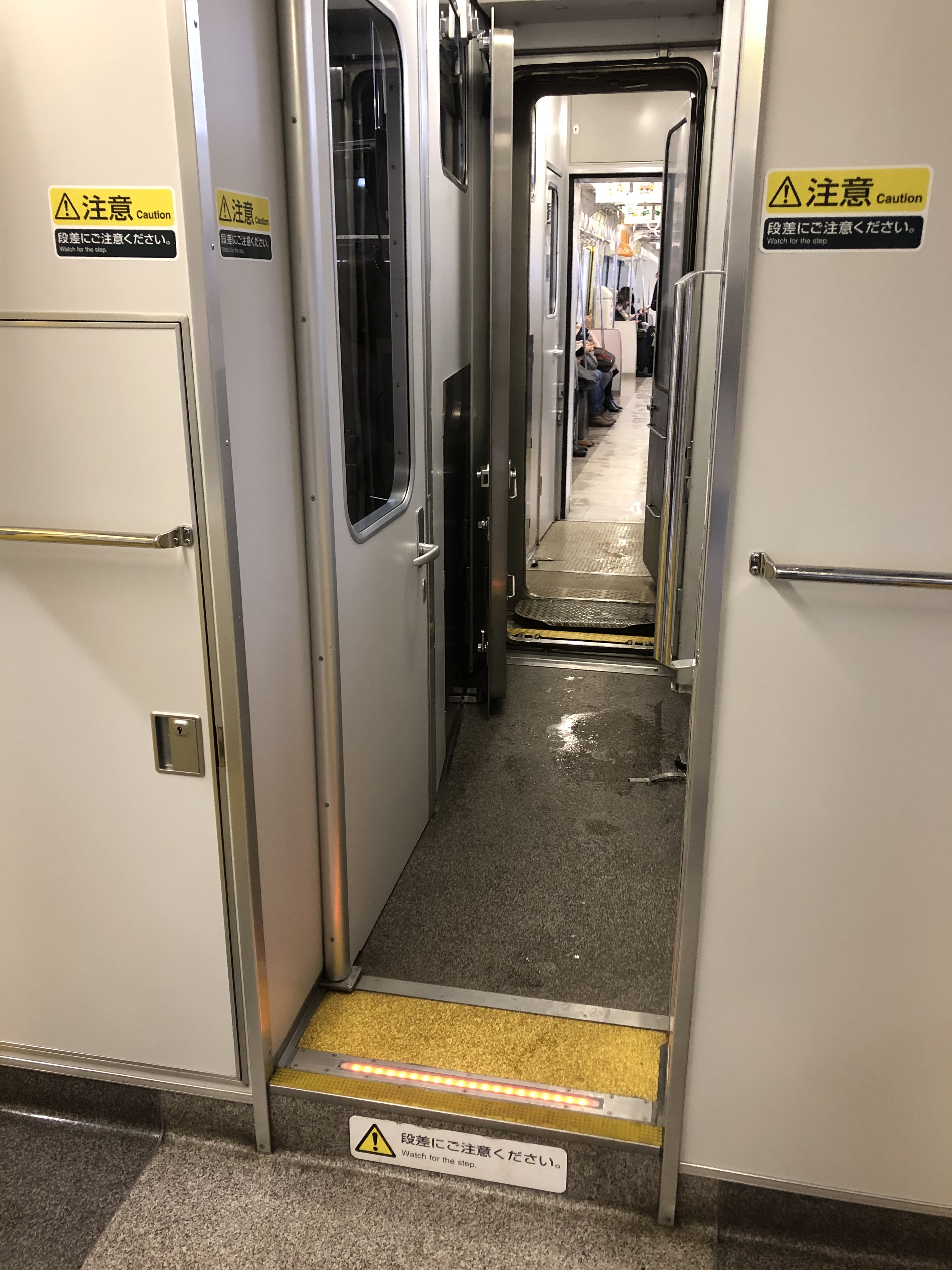 735系の客室と運転室の間に設けられた段差。